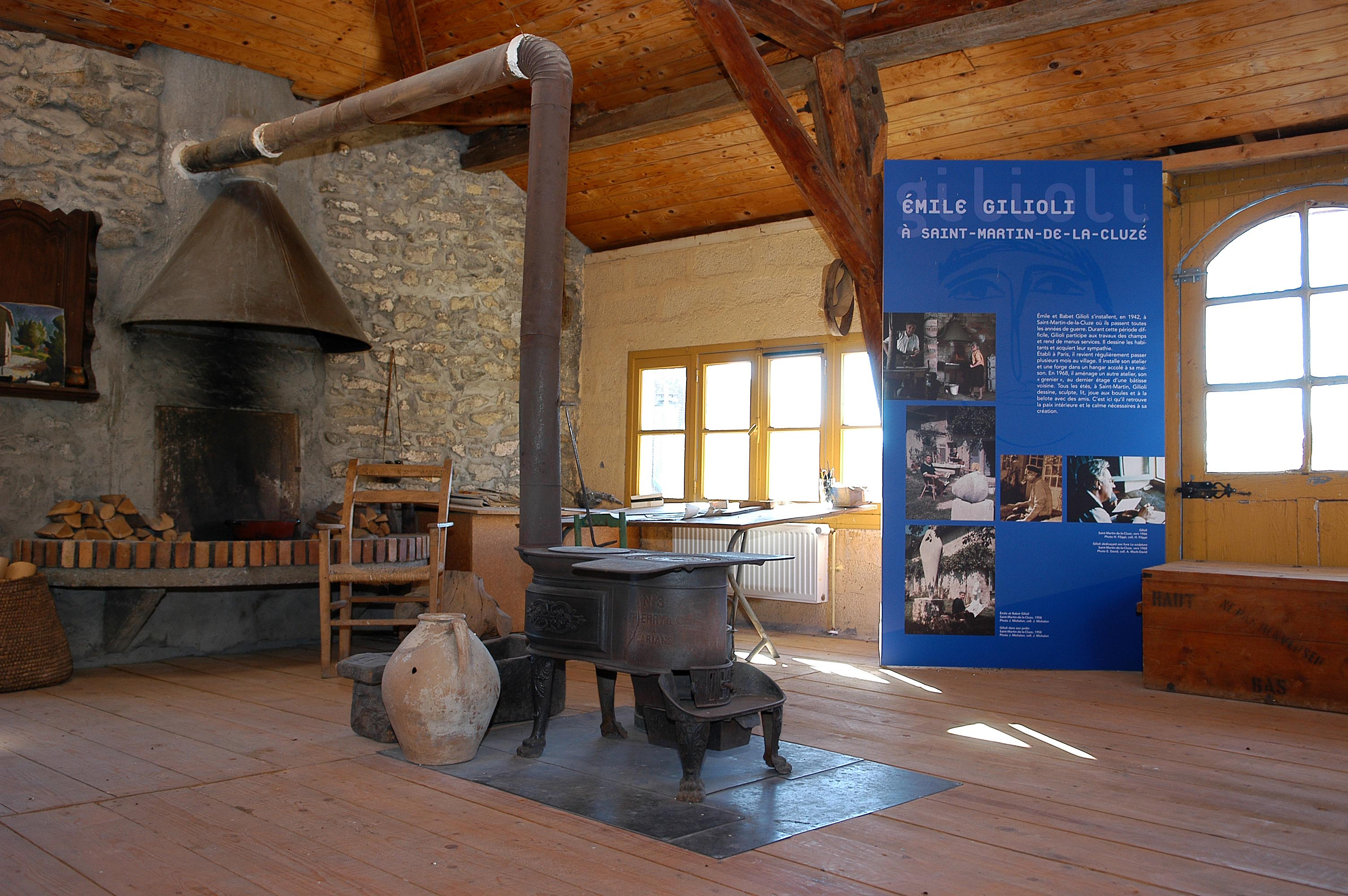 © mairie de Saint-Martin-de-la-Cluze